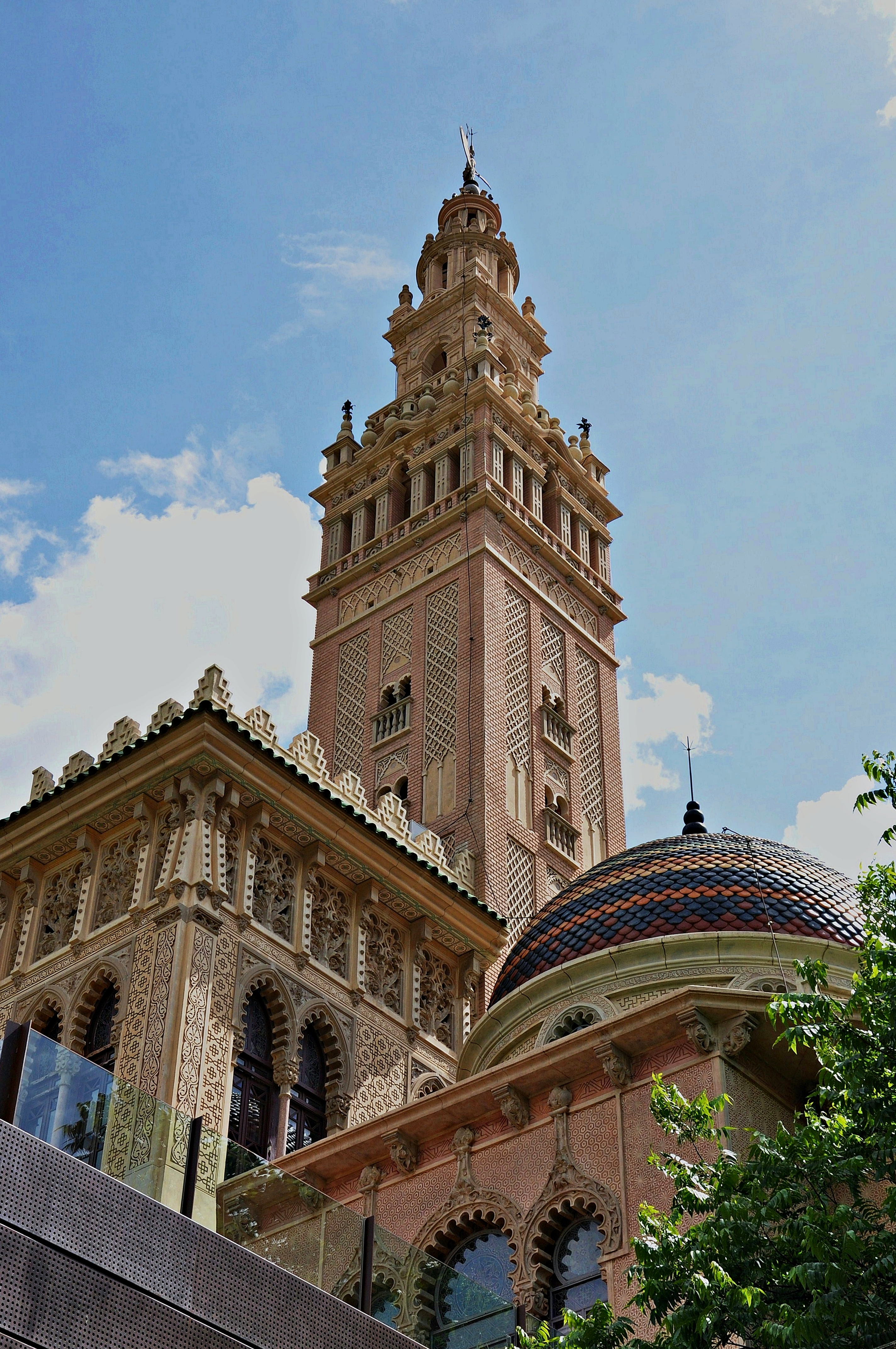 baix penedes-cataluña